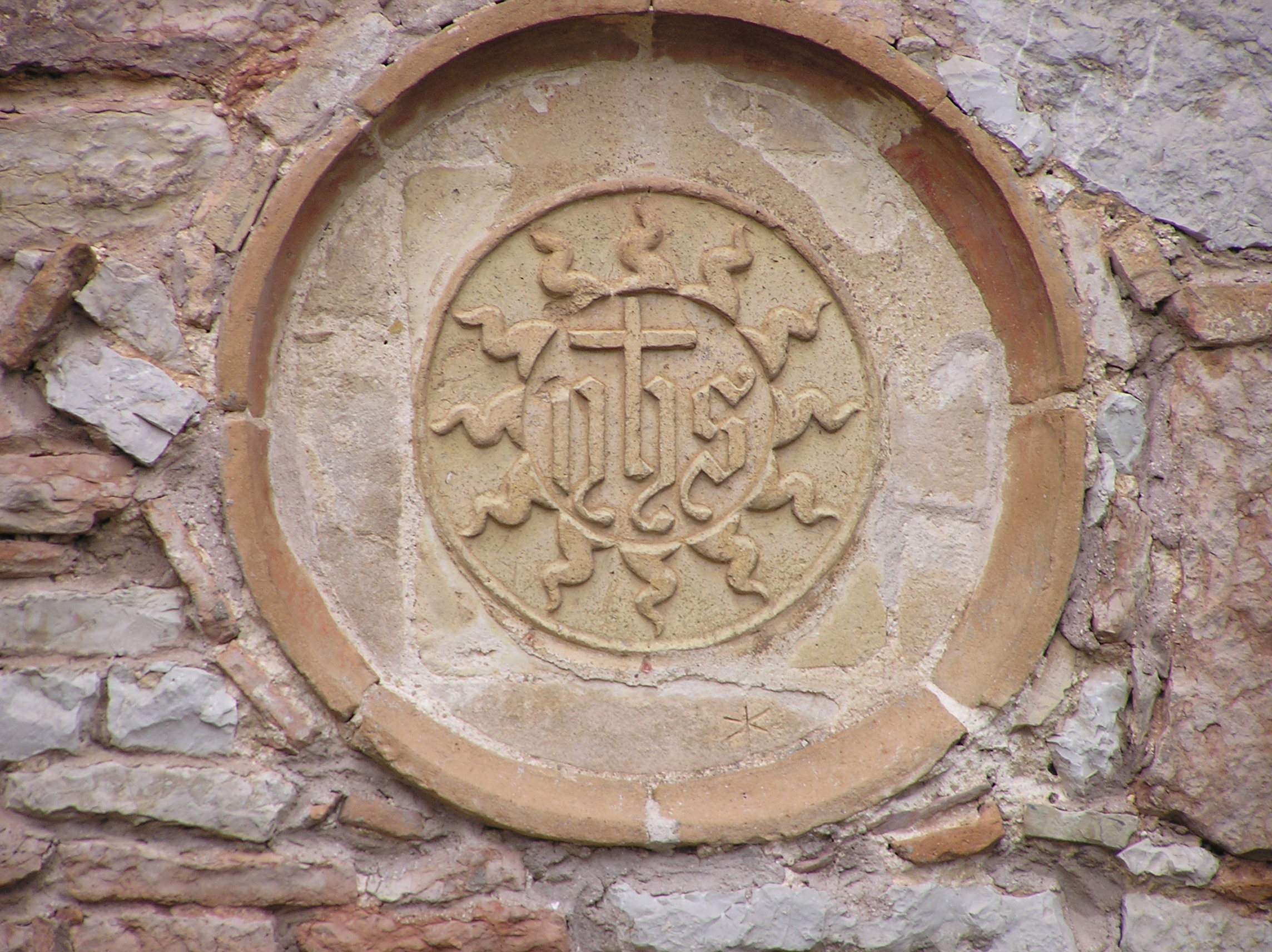 Eremo delle Carceri: seal of Saint Bernardino